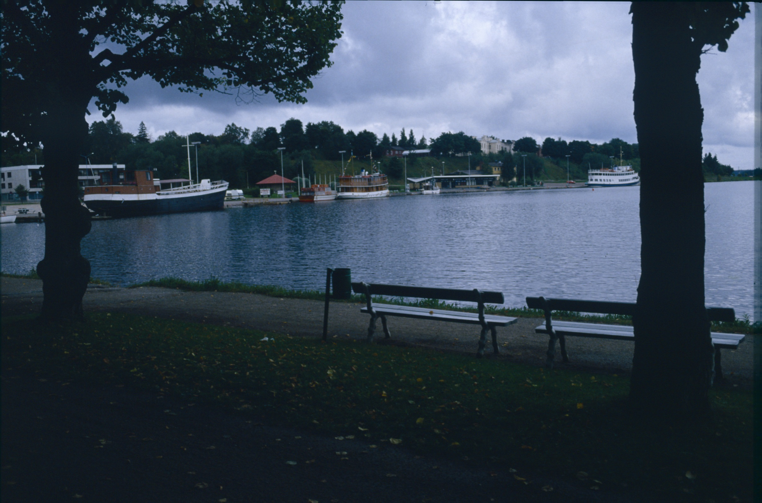 Lappeenrannan satama vuonna 1981